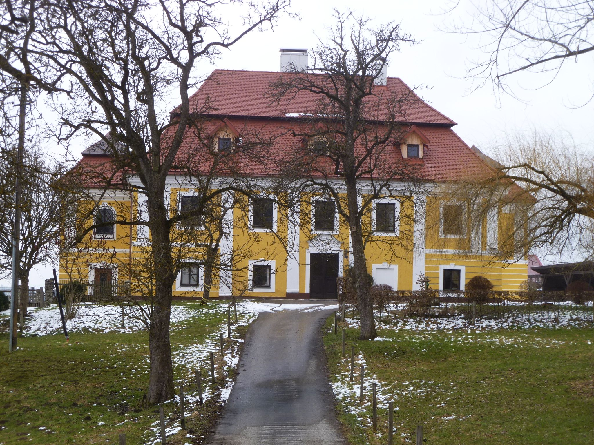 Schloss Walkering heute